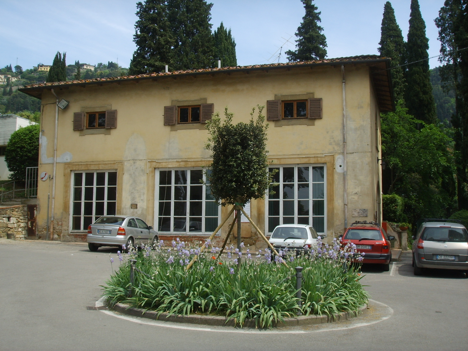 Villa la torraccia, limonaia